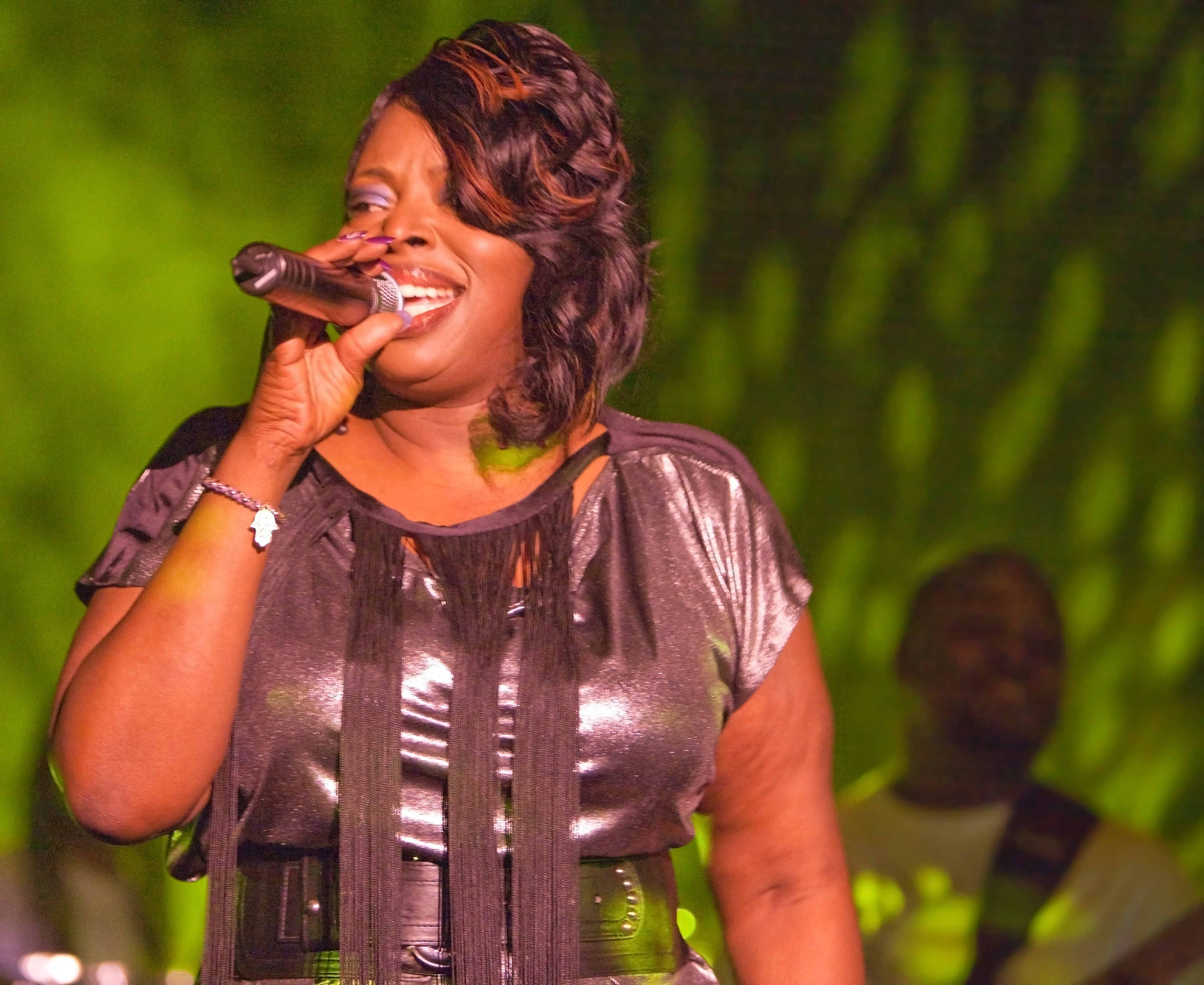 Angie Stone at Berns, Stockholm 2010